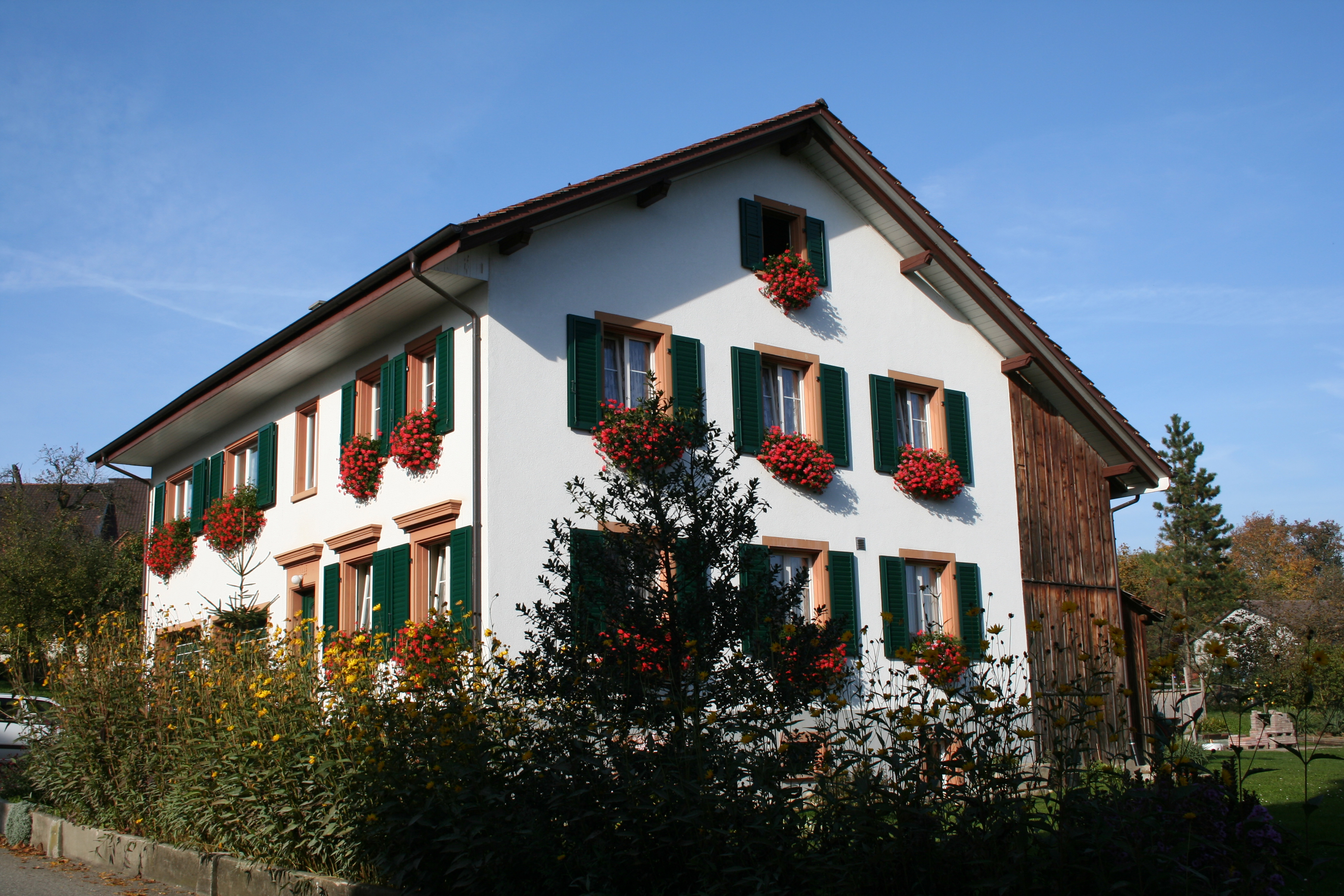 Wohnhaus in Anwil, Schweiz